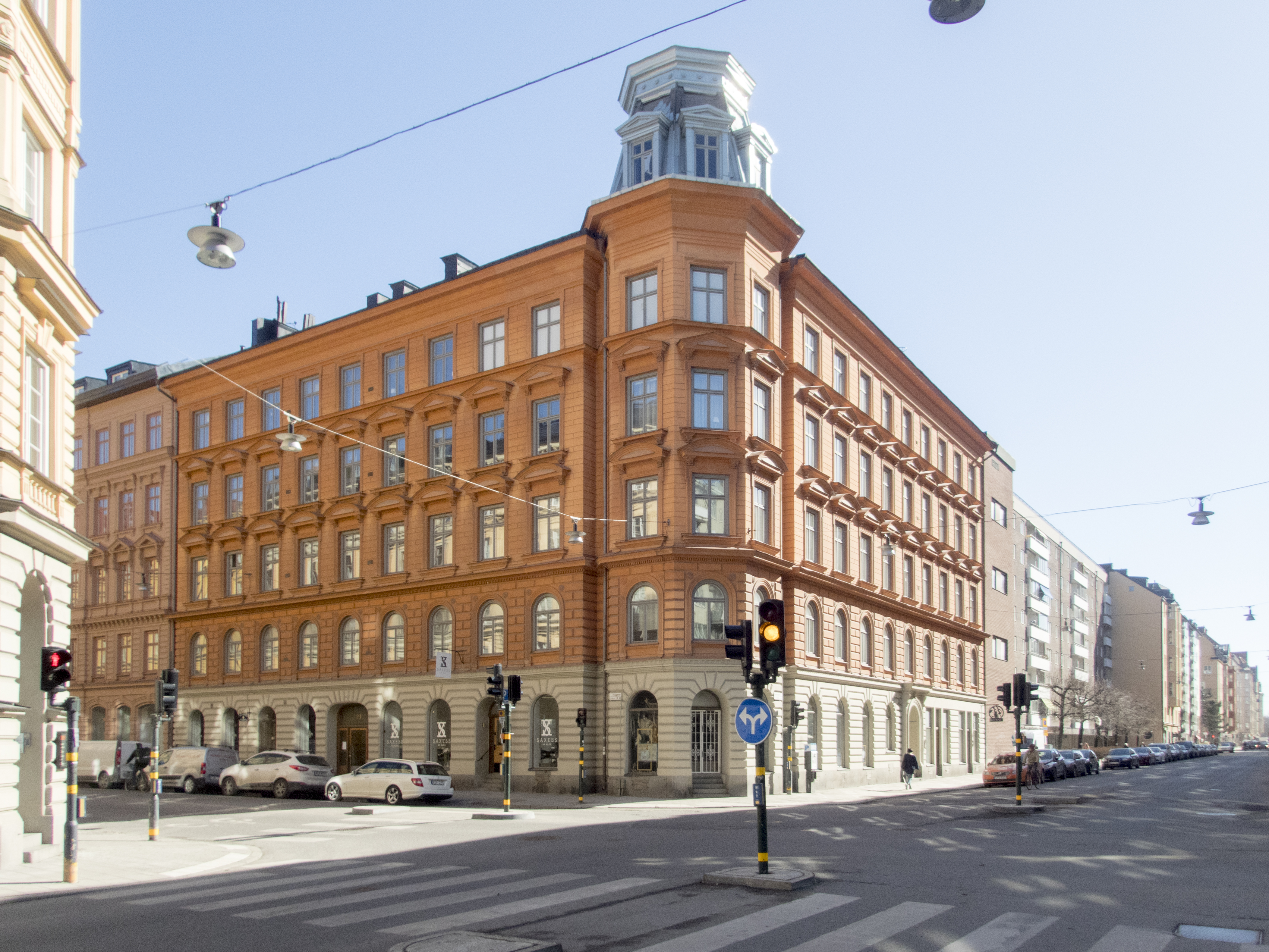 Väduren 7, Frejgatan 21, Roslagsgatan 32 Stockholm Nybyggnadsår 1883 - 1884 Johan Arvid Vallin (Arkitekt) Okänd (Byggmästare) V. Carlsson (Byggherre)